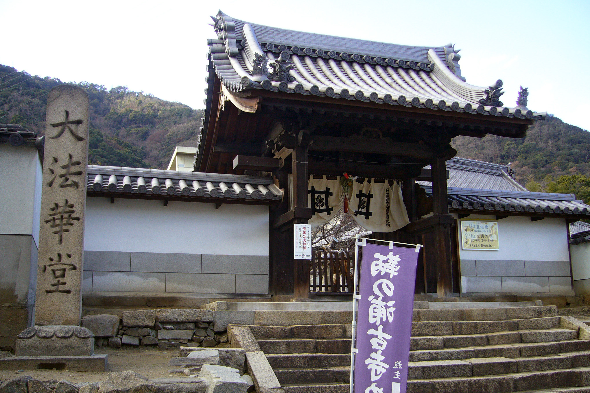 Hosenji in Fukuyama, Hiroshima, Japan